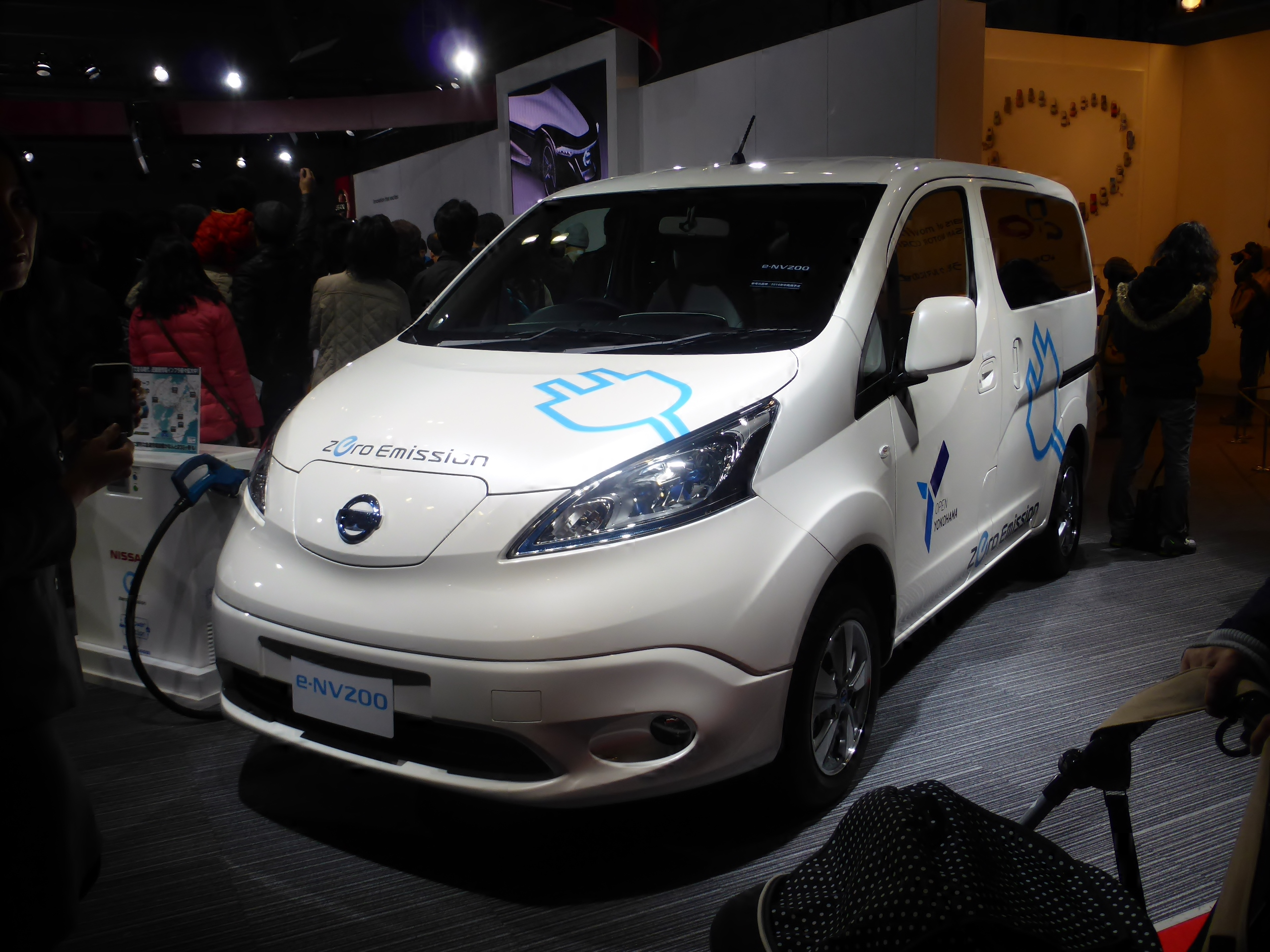 大阪モーターショー2013の日産ブースにおいてM20型e-NV200を撮影。